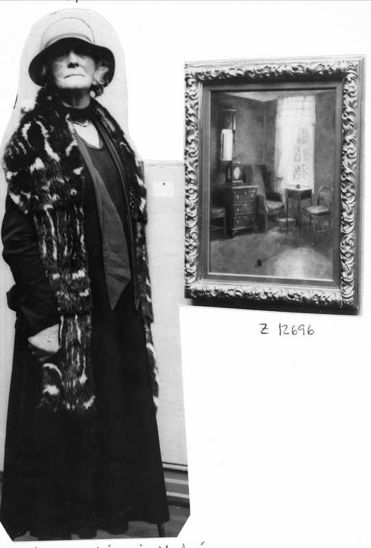 Den norske maleren Mimi (Marie Bolette Wilhelmine) Falsen (1861-1957) fotografert ca. år 1935 av en ikke identifisert fotograf.